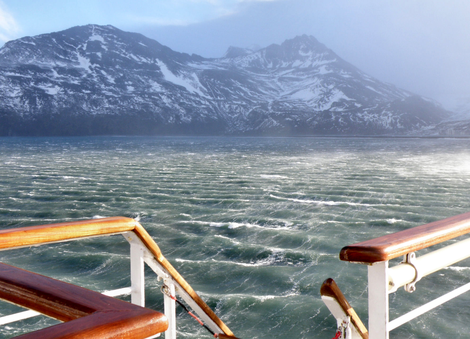 Géorgie du Sud - La baie de St Andrews sous le vent catabatique